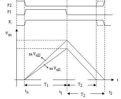 Vremenski dijagram ADC sa dvojnom integracijom. (Ja sam autor ove slike, koristim je za seminarski rad i predajem je u javno vlasništvo).